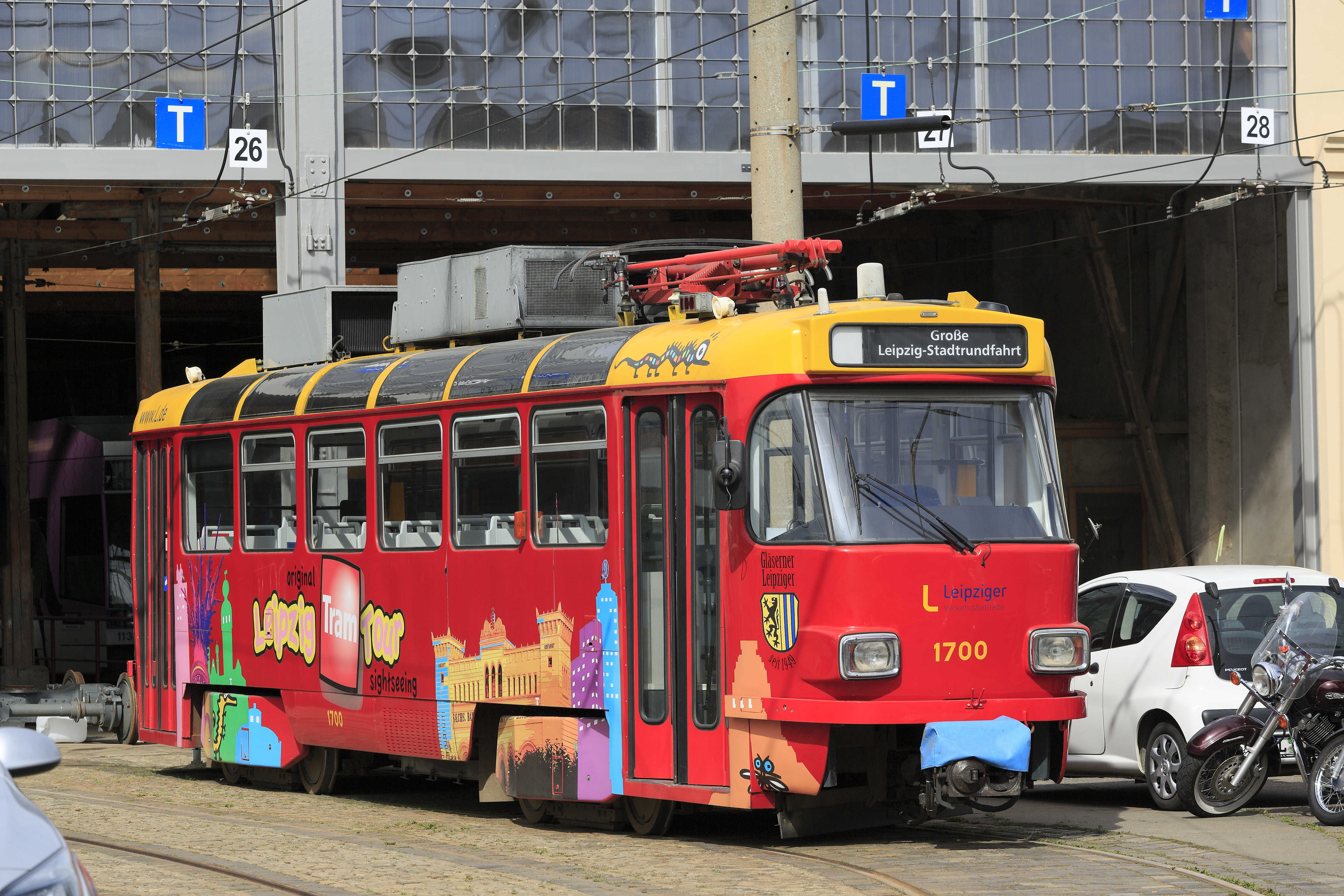 Einer der beiden Triebwagen des »Gläsernen Leipzigers«, die Wagen des Stadtrundfahrtzuges sind mit gepolsterten Sitzen und Dachfenstern versehen worden, doch auch weiterhin mit den modernisierten Wagen der Typen 33c, 33d, 65c, 65d, 65g und 68 kuppelbar. Sie werden fallweise auch im Linienverkehr eingesetzt.